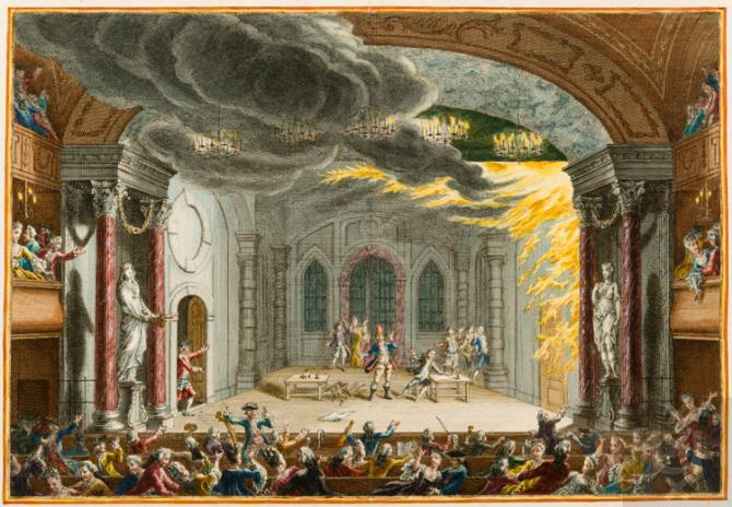 Brand in de schouwburg van Vingboons.Ingekleurde prent